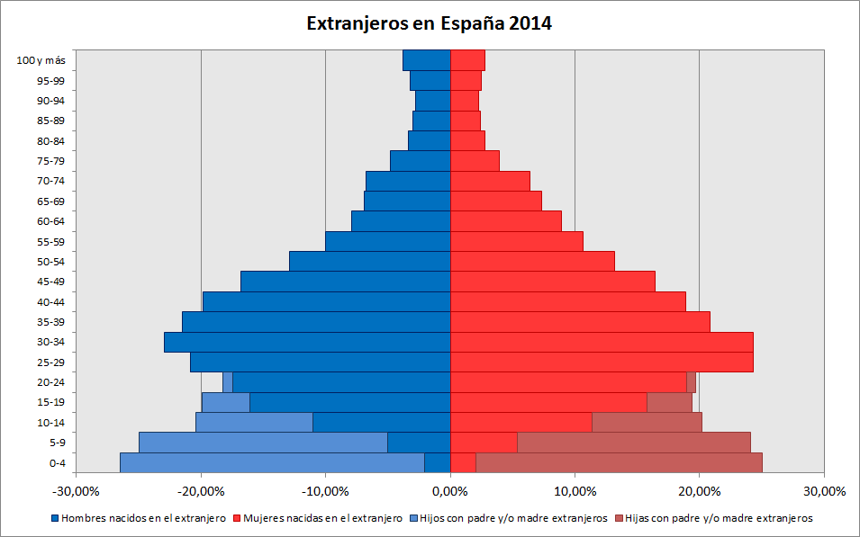 Poblacion extranjera de primera y segunda generación censada en España en el año 2014. Fuente I.N.E